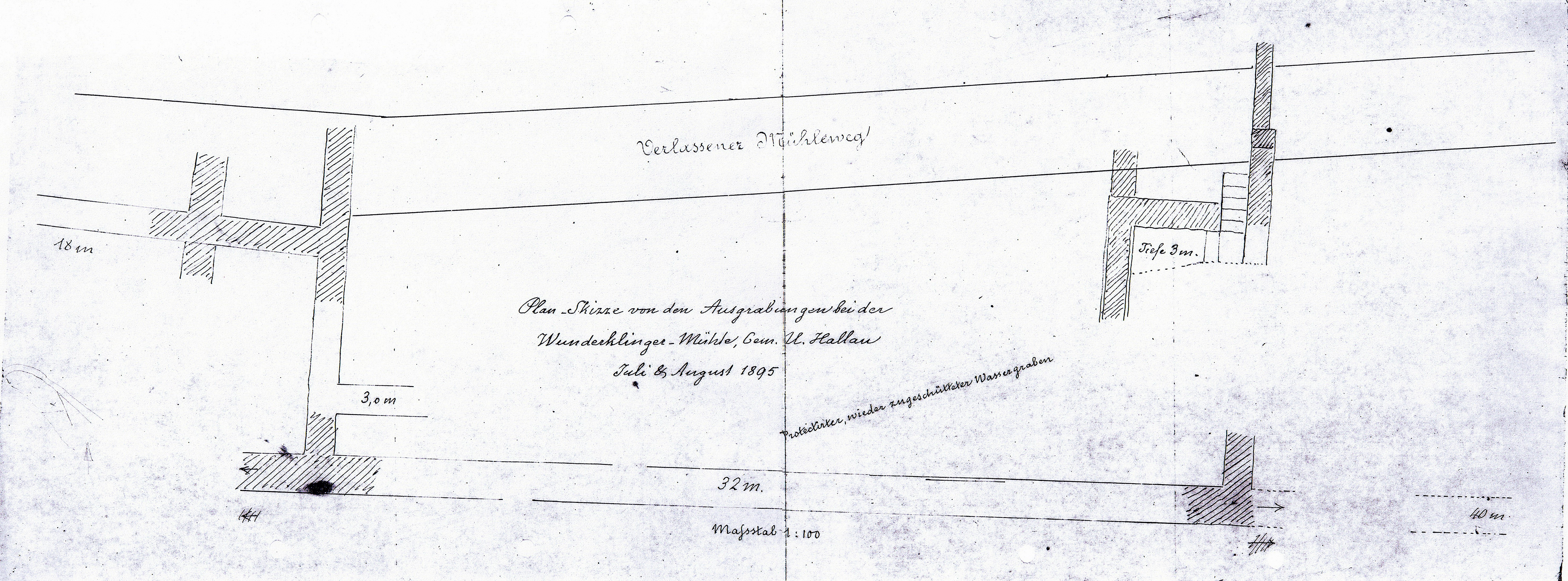 Plan-Skizze von den Ausgrabungen bei der Wunderklinger-Mühle, Gem. U. Hallau Juli & August 1895